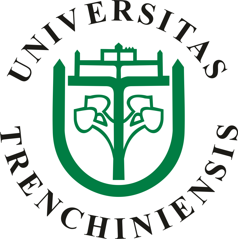 Logo Trenčianska univerzita Alexandra Dubčeka v Trenčíne